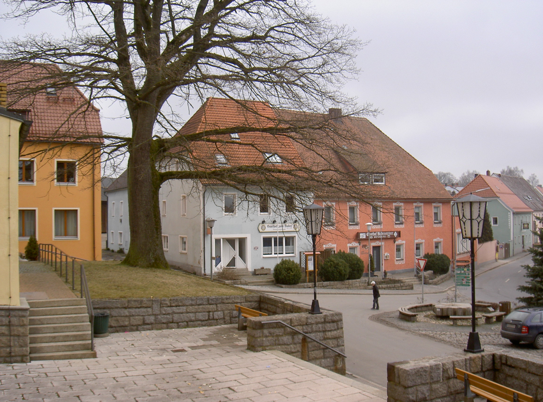 Moosbach (Oberpfalz)